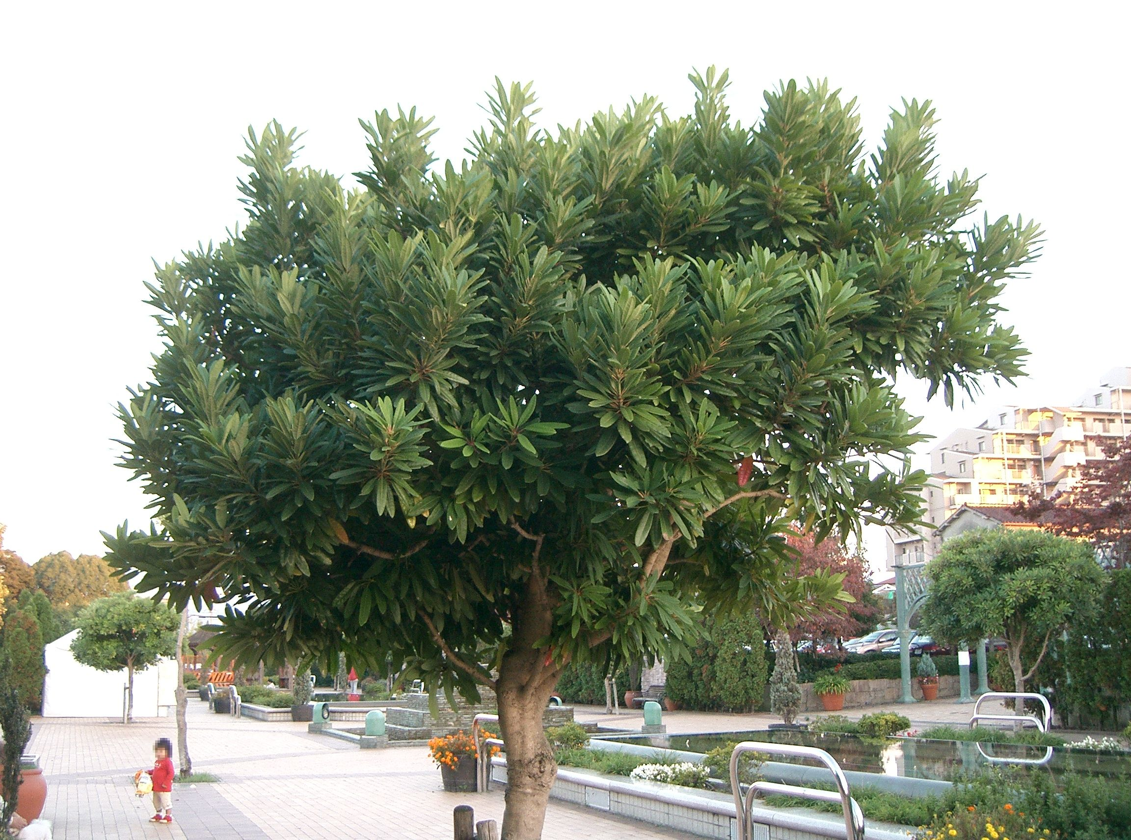 Daphniphyllum teijsmannii(=D. amamiense=D. glaucescens subsp. teijsmannii)